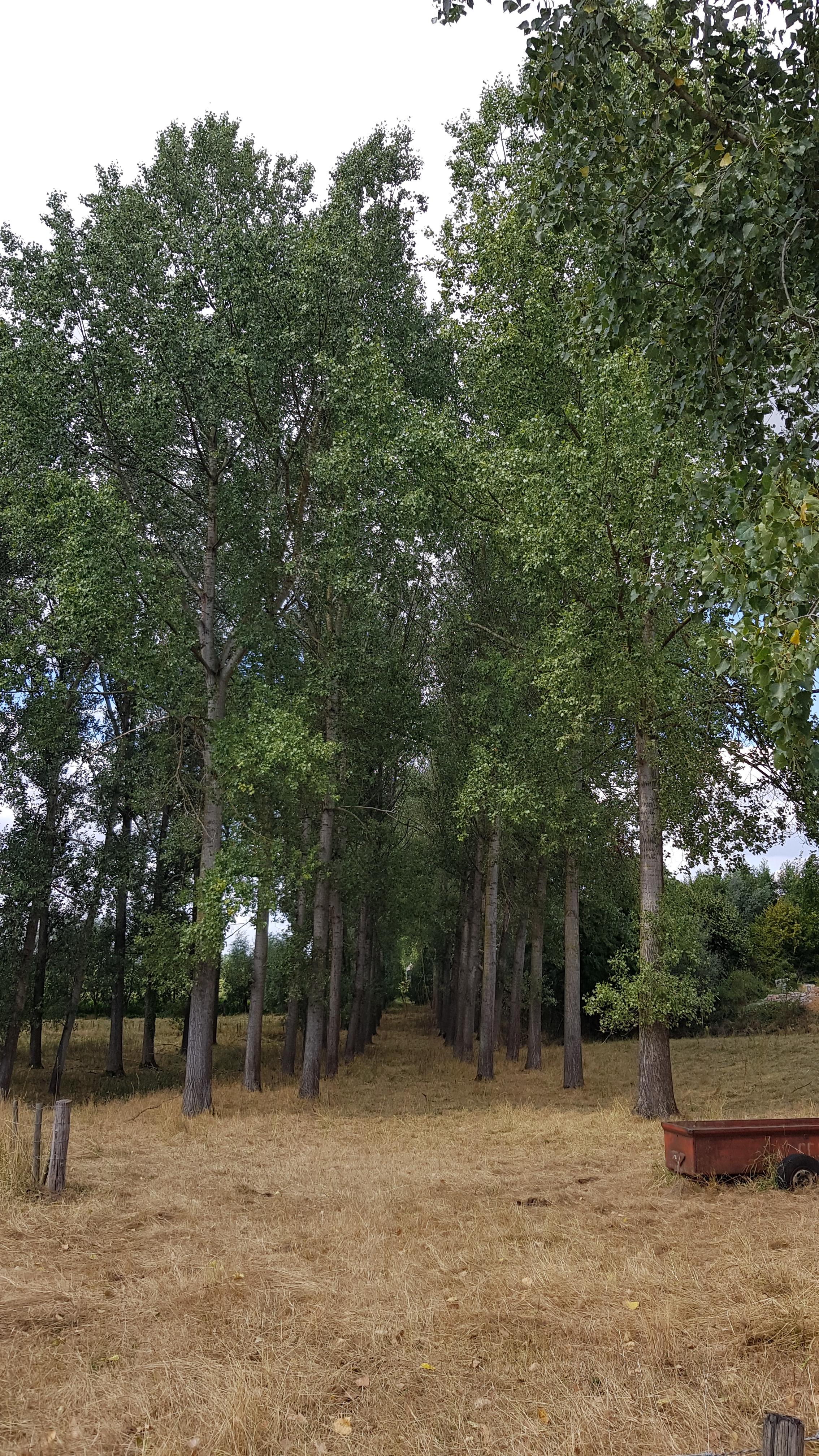 Sint-Lambertusbron, Wintershoven, Kortessem, België This photo of immovable heritage has been taken in the Flemish Region